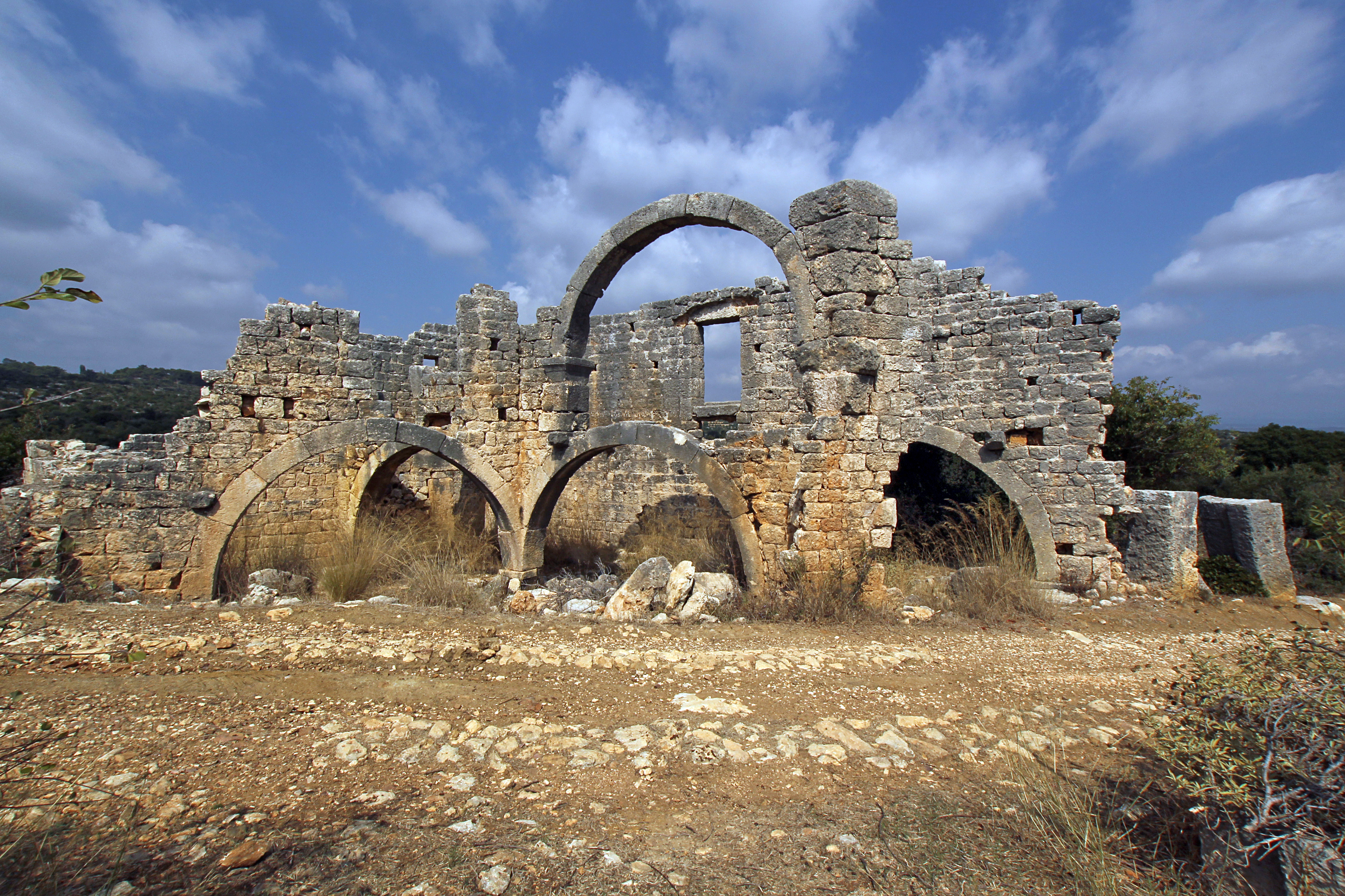 Öküzlü, römische Siedlung nahe Kızkalesi, Südtürkei, frühbyzantinisches Haus